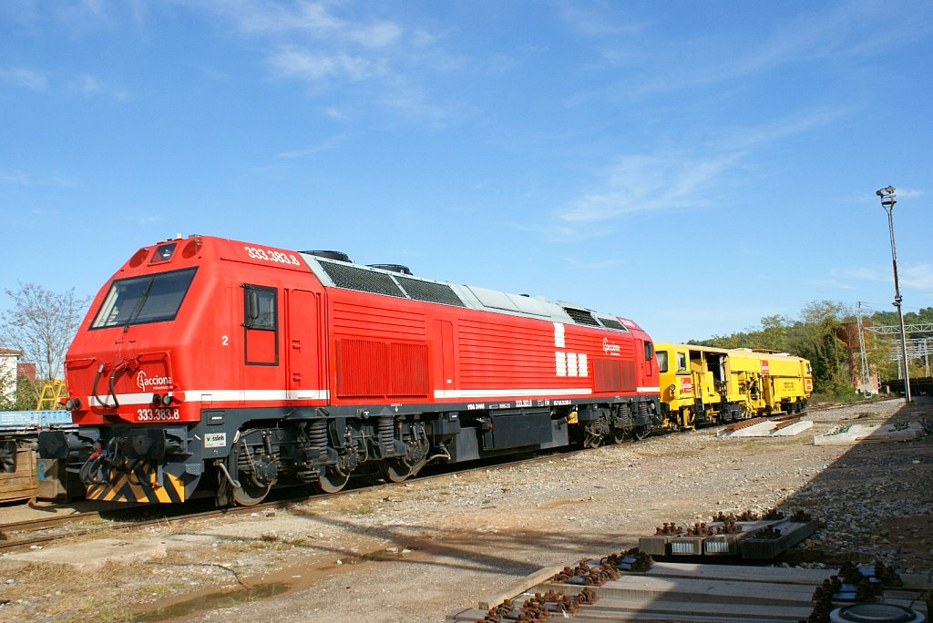 Maquina 333.383 de Acciona a Flaçà.